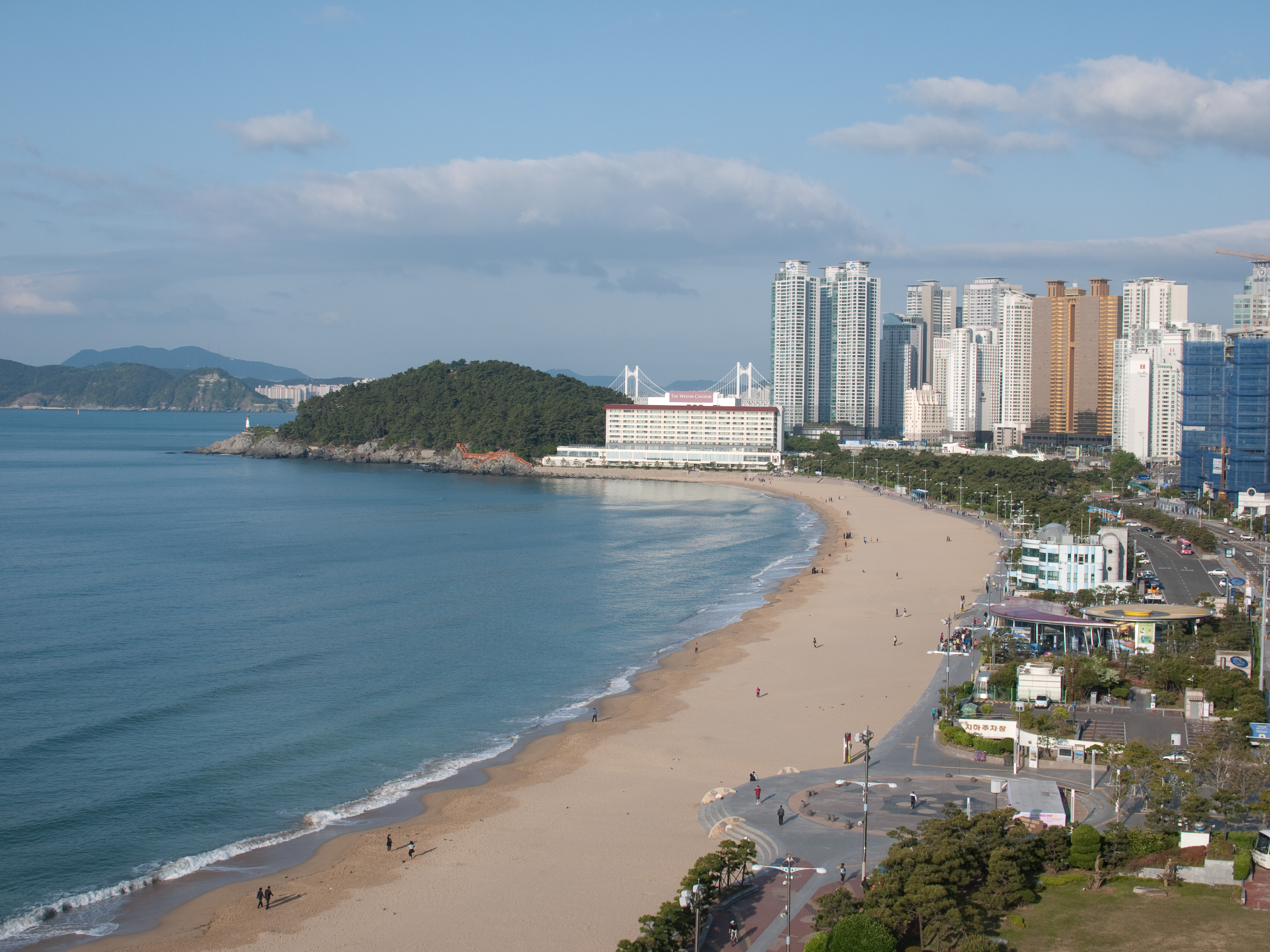 Haeundae Beach